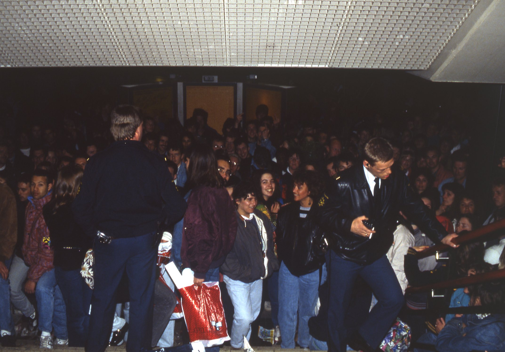 Spoorwegpolitie die reizigers tegenhoudt bij de trap naar het perron toe, tijdens de Koninginnedag 1991. (Zie voor de discussie: [1].)